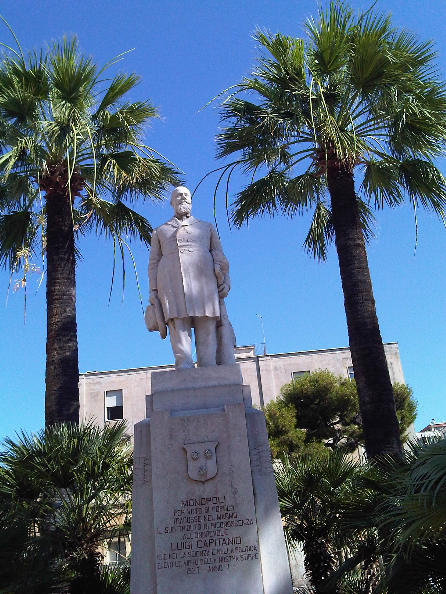 Monumento al Dott. Luigi Capitanio, piazza Milite Ignoto, Monopoli (BA) Italia